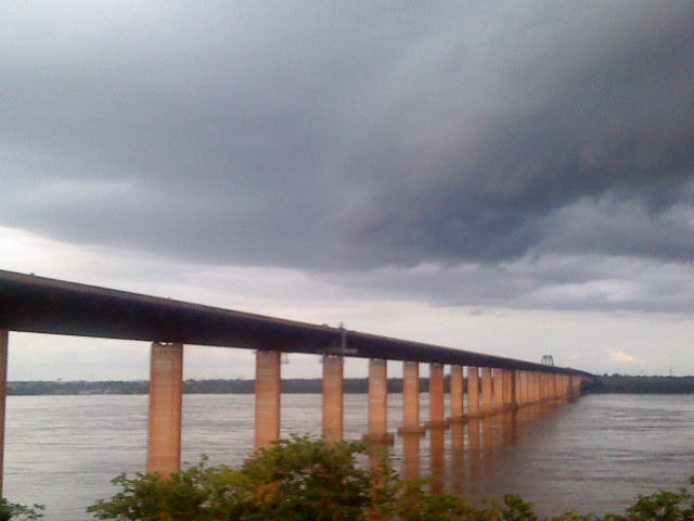 Ponte Mista de Maraba vista a partir do anel viário de acesso